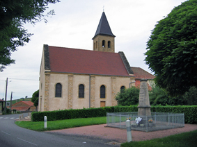 Kirche von Cortambert (F-71250 Cortambert)